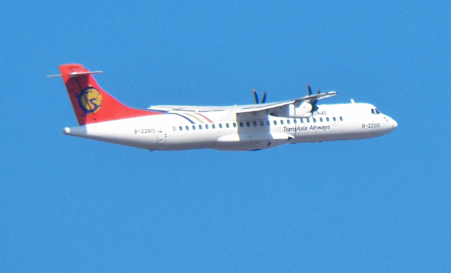 從臺北松山機場起飛的復興航空ATR 72-500 B-22810客機。